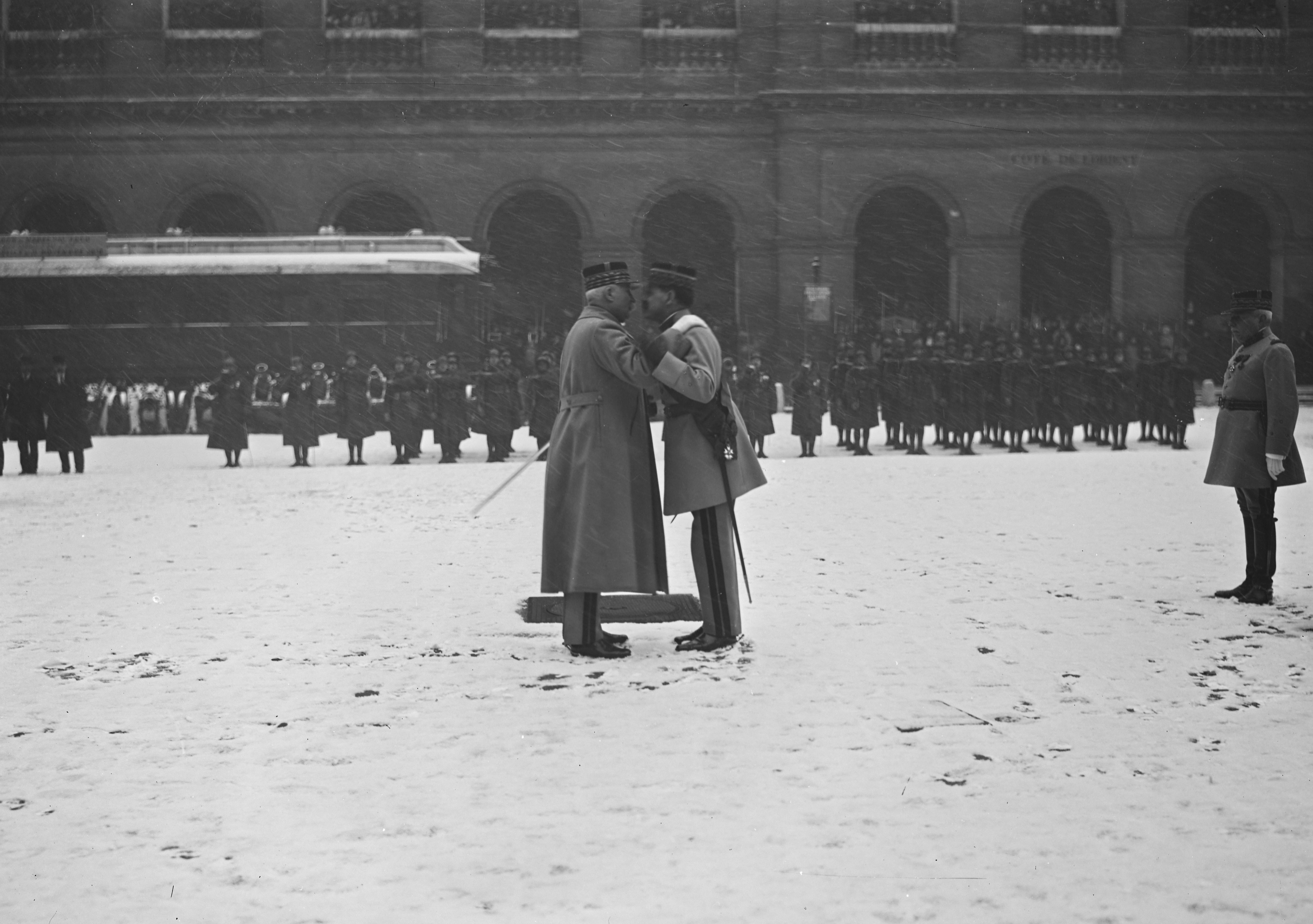 Le maréchal Pétain remet les insignes de Grand Croix au général Berdoulat dans la cour des Invalides